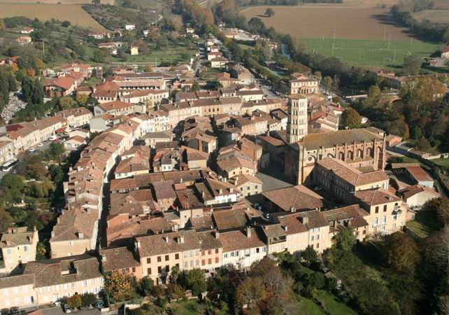 Vue aérienne de Lombez